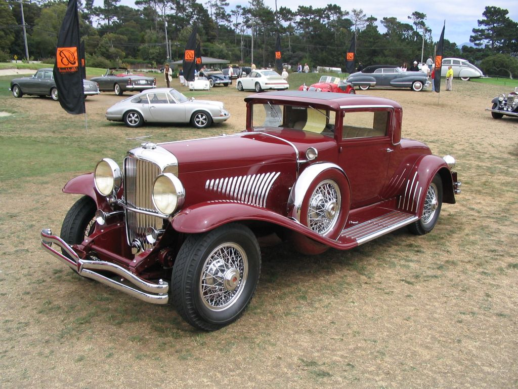 Duesenberg J Judkins Baujahr 1932, fotografiert von Ramgeis in Pebble Beach, Kalifornien im August 2004, GNU-FDL first upload in de wikipedia on 05:14, 17. Okt 2004 by Ramgeis